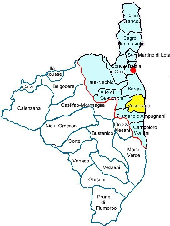 Localisation du canton de Vescovato, Casinca, Castagniccia, Haute-Corse